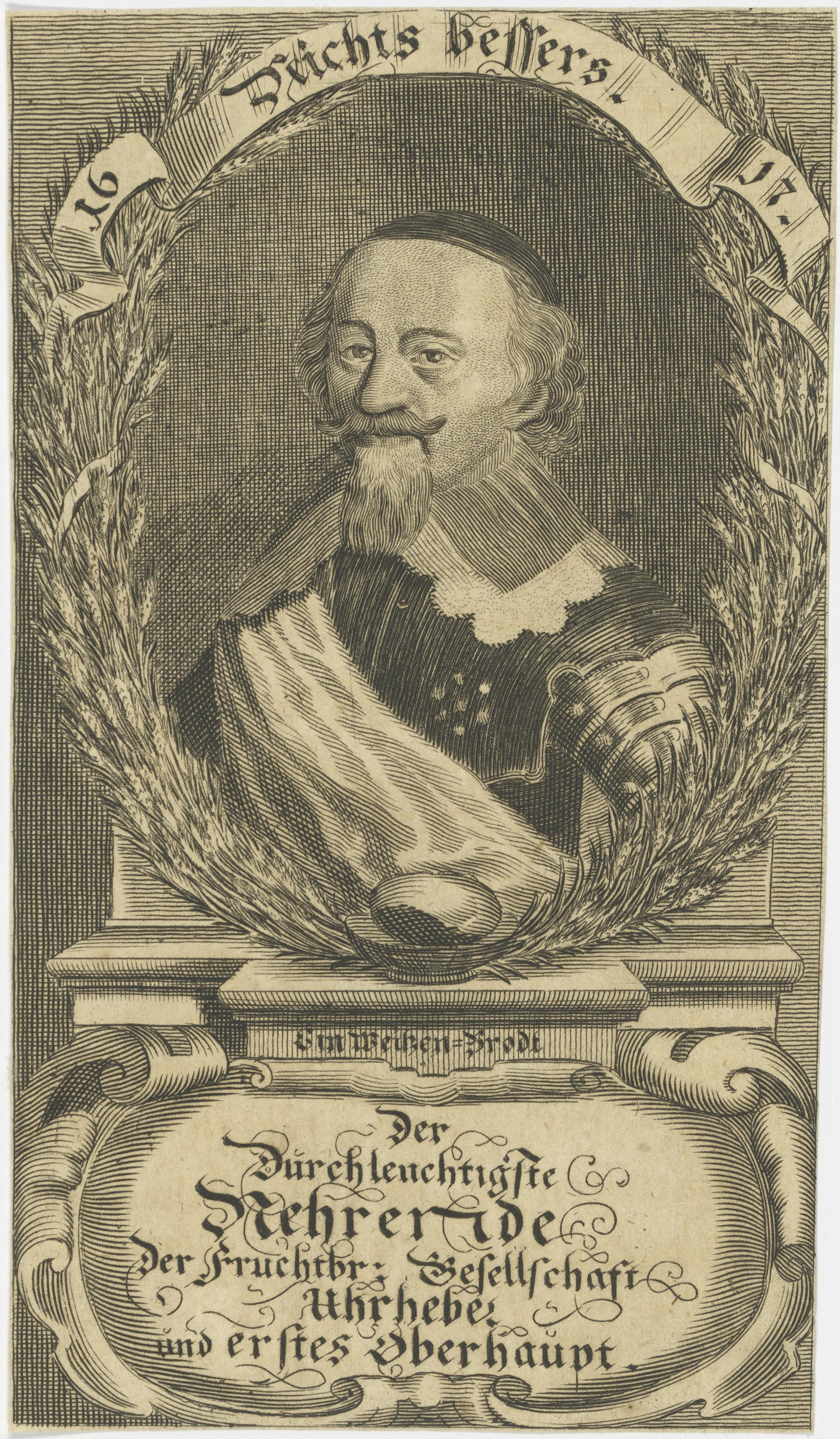 Fürst Ludwig von Anhalt-Cöthen auf einem Kupferstich von A. Römer; über seinem Portrait sein Wahlspruch Nichts besser, vor ihm sein Symbol, das Weizenbrot und sein Gesellschaftsname unter ihm: Der Nährende. Kupferstich; Radierung 154 x 86 mm (Blatt) Leipzig, Universitätsbibliothek Leipzig, Porträtstichsammlung, Inventar-Nr. 30/136